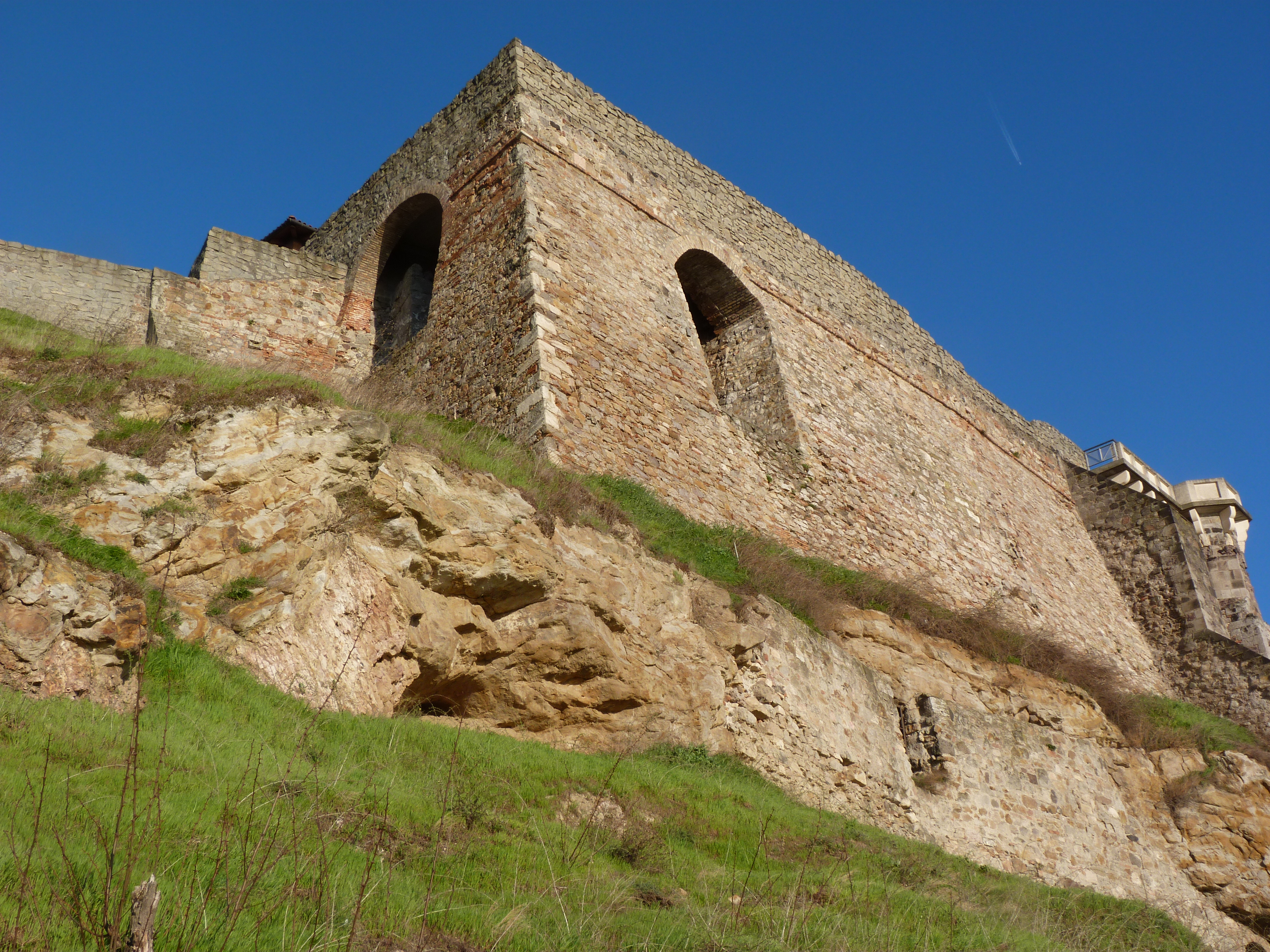 A felvétel 2014. március 19 –én szerdán készült Esztergomban. Szeles, részben borult idő. ©© Derzsi Elekes Andor, Budapest, 2014, A kép és filmfelvételek egészben, vagy részletekben másolását, bármilyen úton történő sokszorosítását és felhasználását a szerző ellenérték nélkül, jogutódjaira is kihatóan megengedi. Az engedély kiterjed a kereskedelmi célú hasznosításra is. Kéri azonban nevének feltüntetését a felhasználás során. A Metapolisz sorozat valamennyi képe és filmje Creative Commons alatti valamint kereskedelmi - for profit - célra is felhasználható. Ajánlott hivatkozás: Derzsi Elekes Andor: Metapolisz DVD line